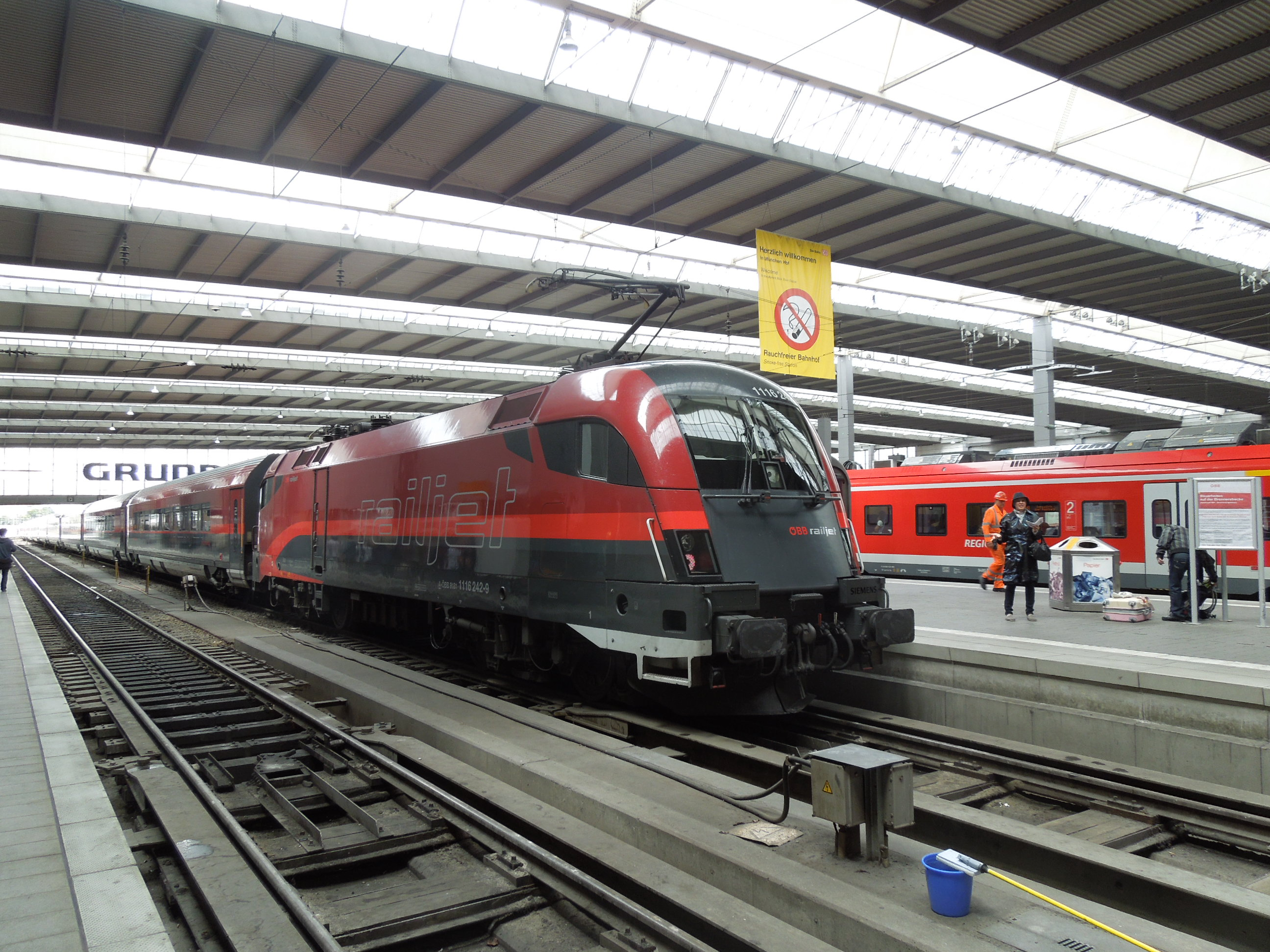 Railjet München Hauptbahnhofon